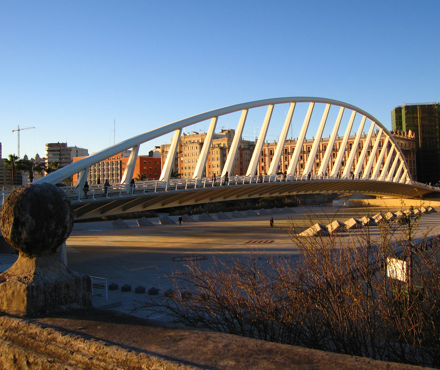 Pont de l'Albereda o de l'Exposició (València, Spain)